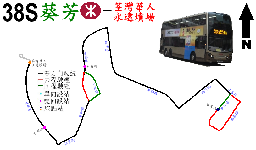 中文（香港）: 九巴38S線的走線圖